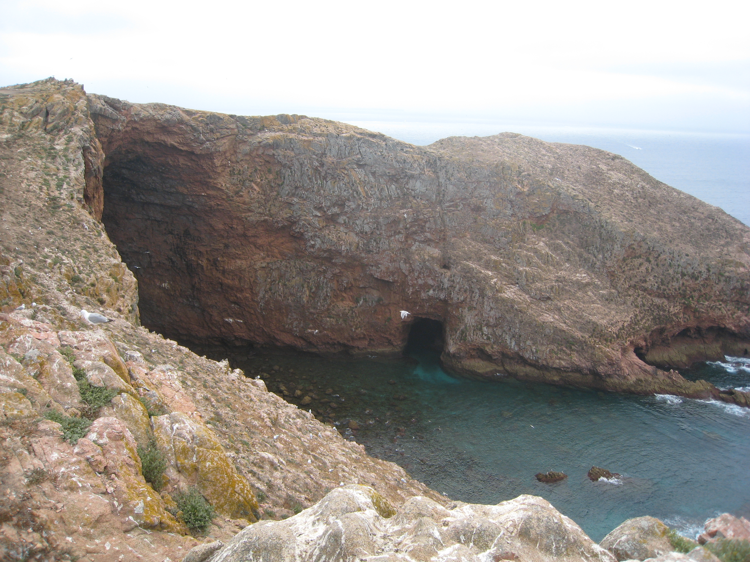 Berlengas